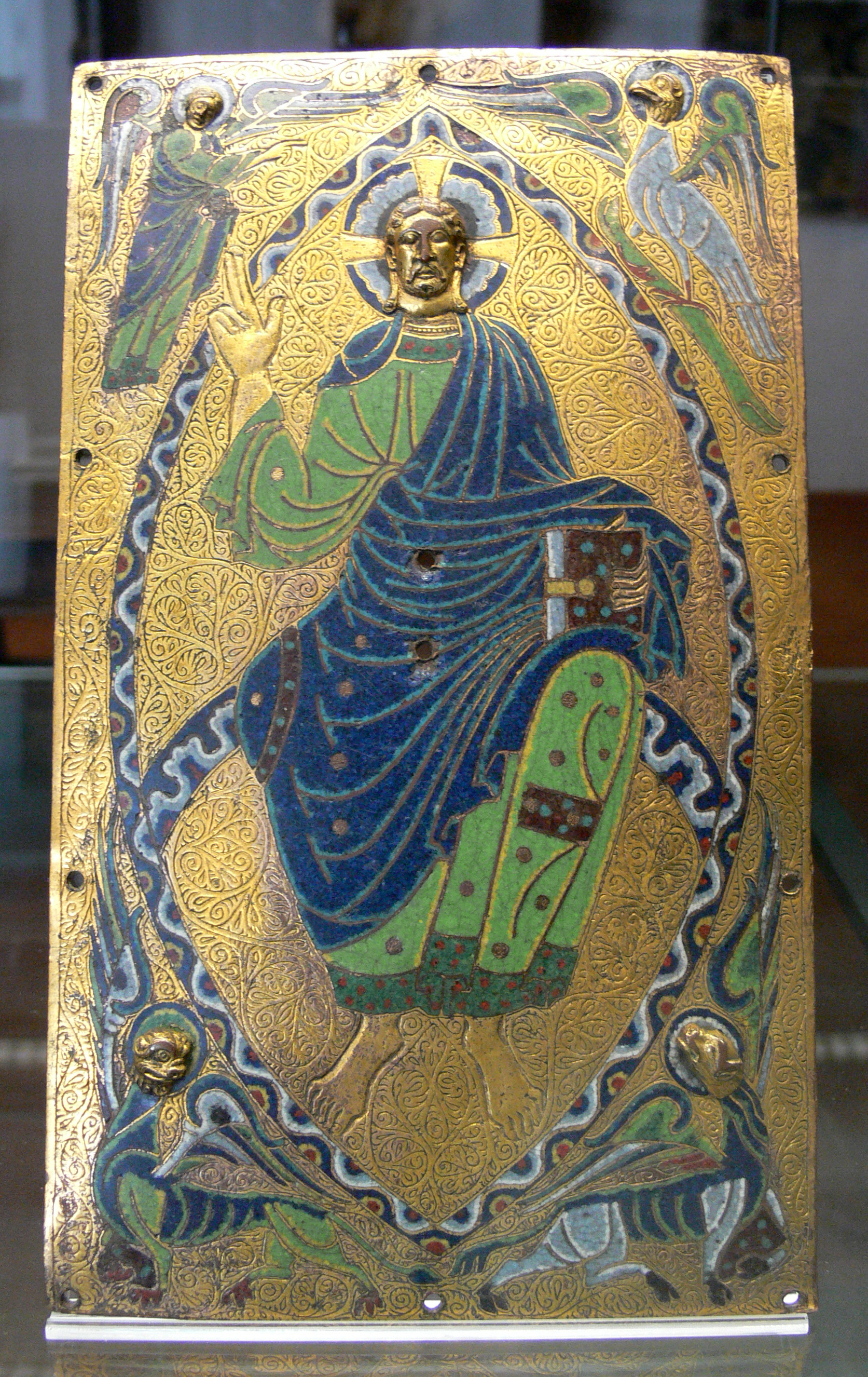 Christus; Grubenschmelz; Limoges Kunstgewerbemuseum Berlin